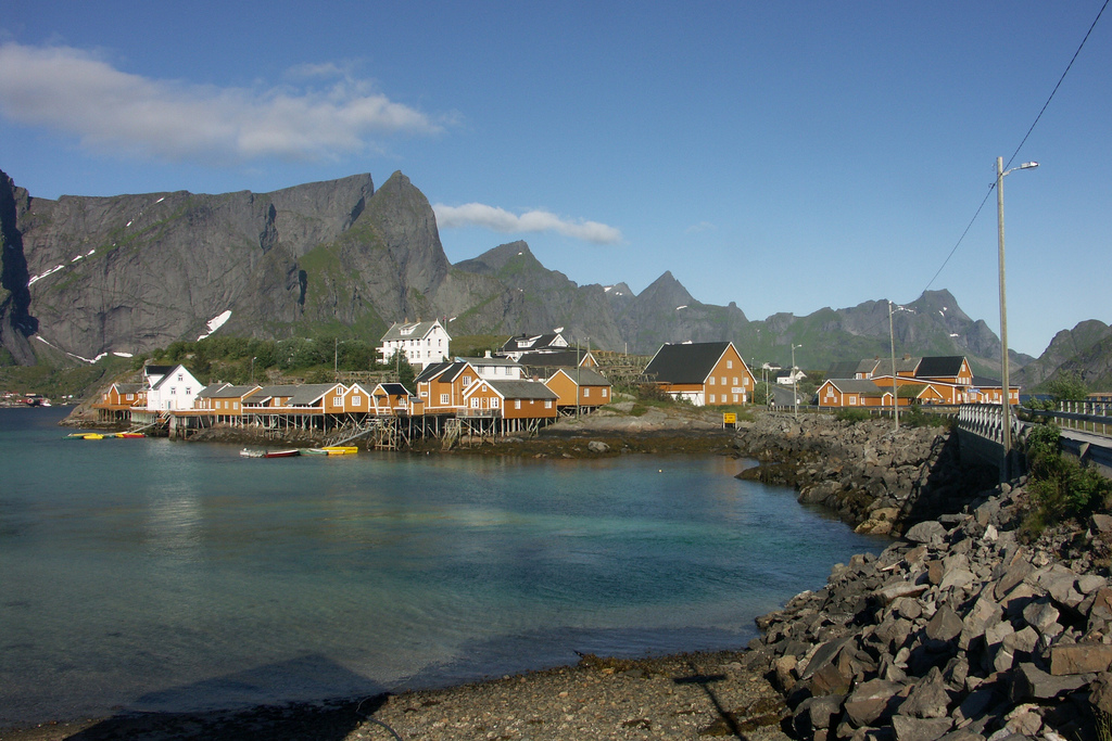 Sakrisøy